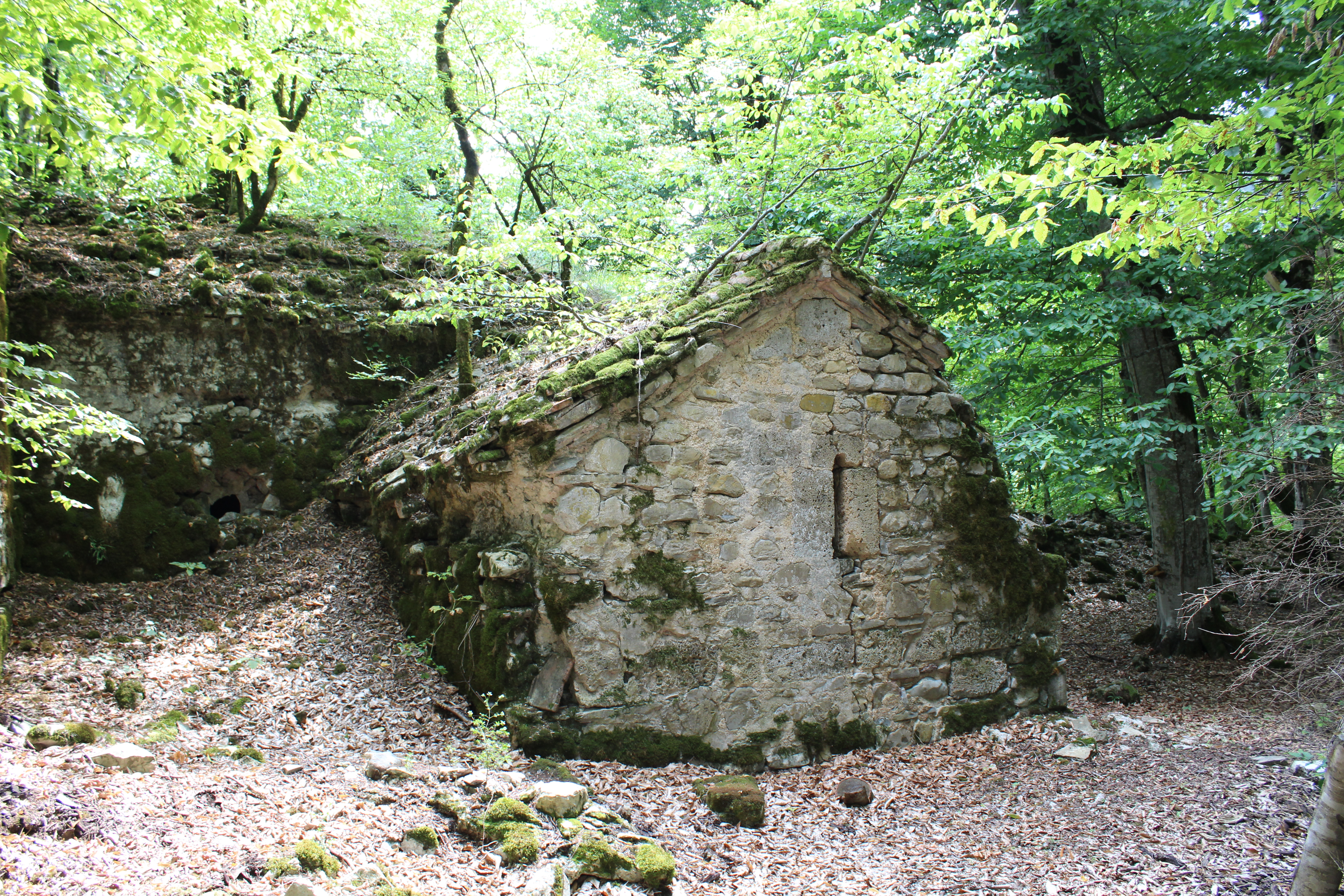 ქაჩალაურის ციხის ეკლესია